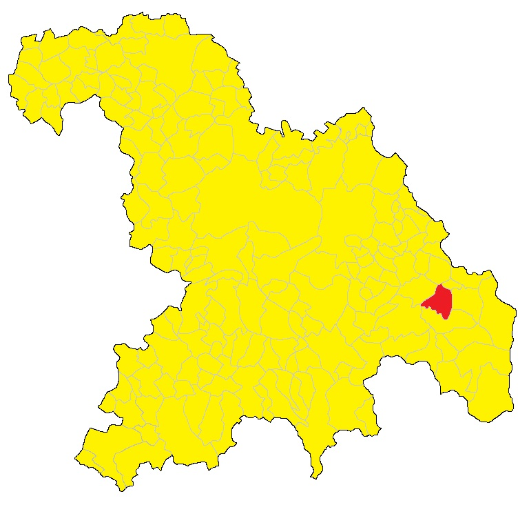 Mappa del comune di Dernice (AL)